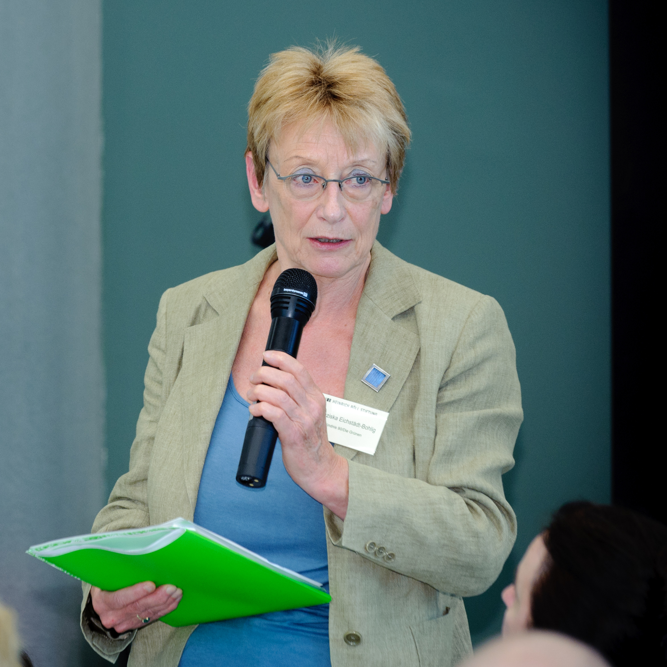 Franziska Eichstädt-Bohlig (MdA, Sprecherin f. Stadtpolitik, Bündnis 90/Die Grünen im Berliner Abgeordnetenhaus) Foto: Stephan Röhl